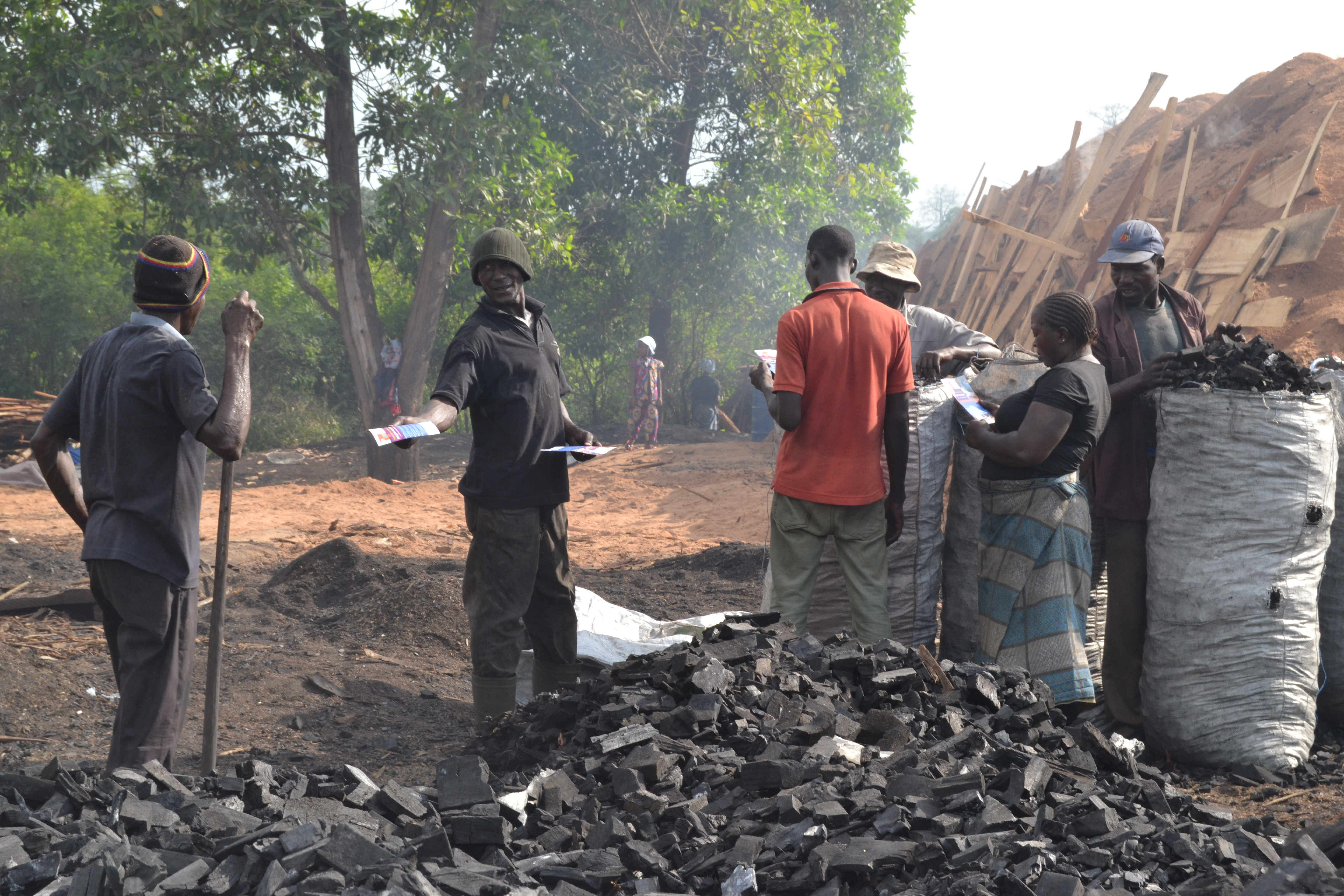 Fabricant de charbon de bois sur son site de production à Yamoussoukro, Côte d'Ivoire. This is an image of "African people at work" from Ivory Coast